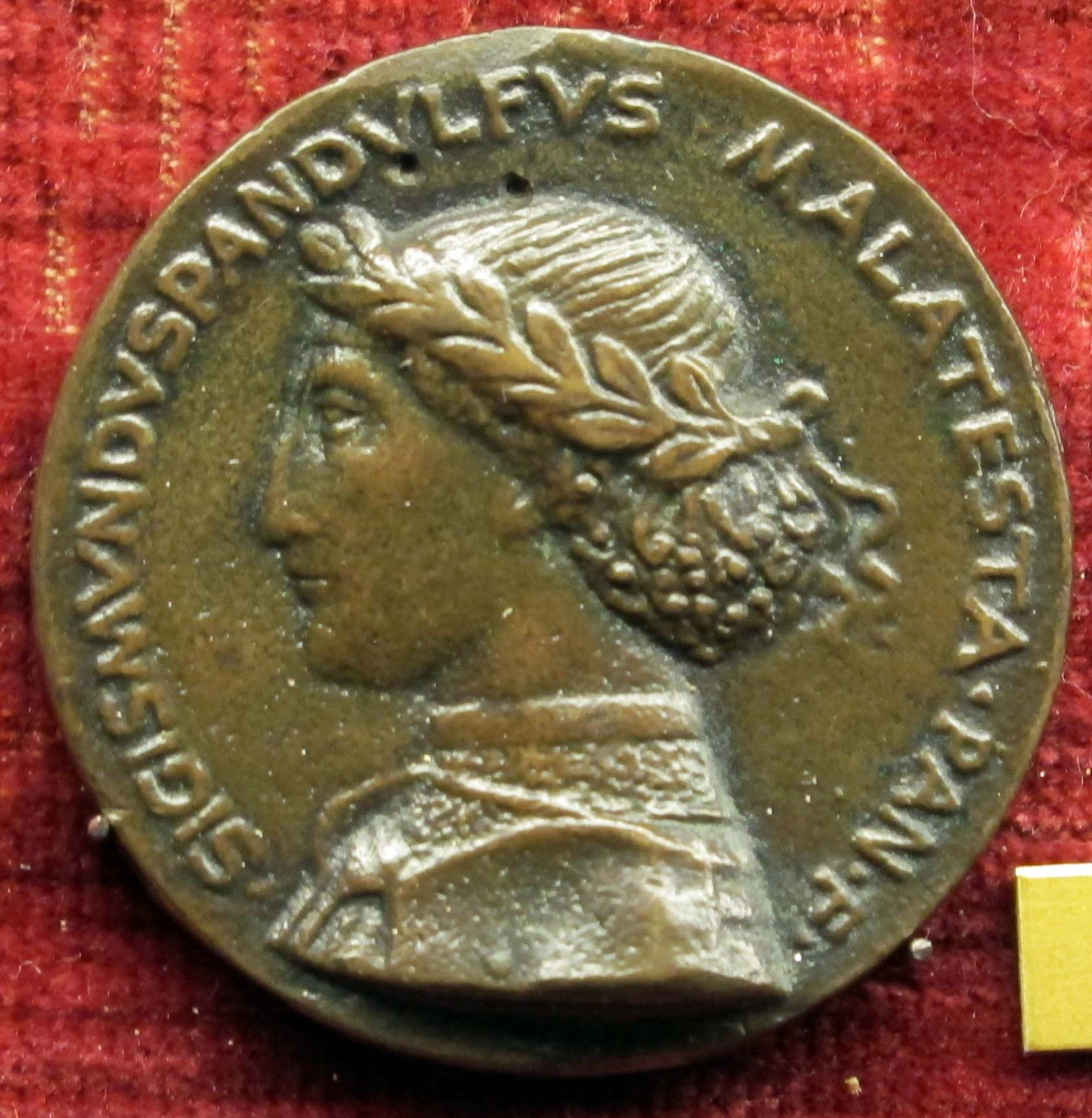 Matteo de' pasti, medaglia di sigismondo pandolfo malatesta col tempio malatestiano, recto 1450